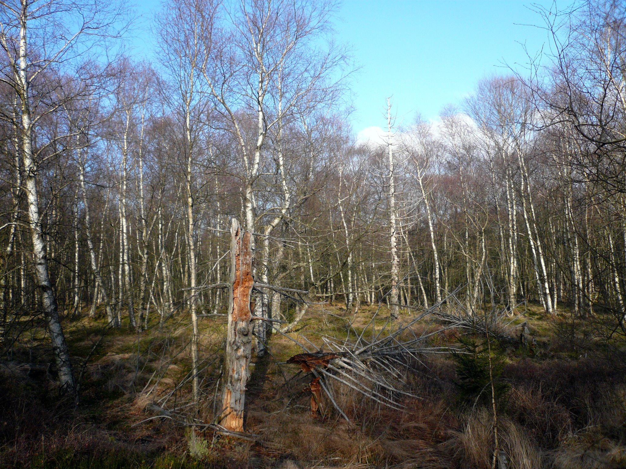 Rotes Moor, Birkenwald